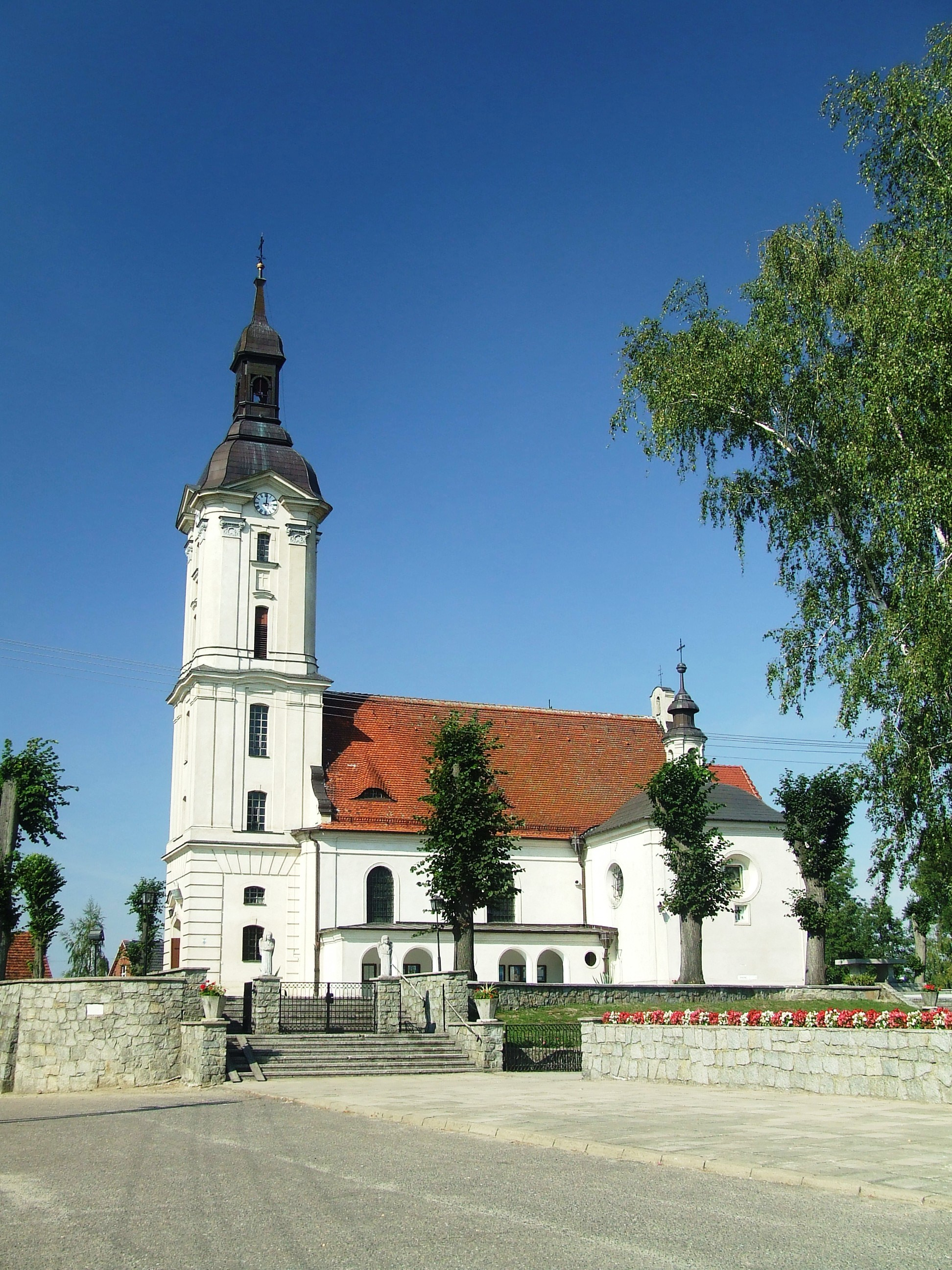 Sanktuarium Matki Bożej Pocieszenia w Górce Duchownej.